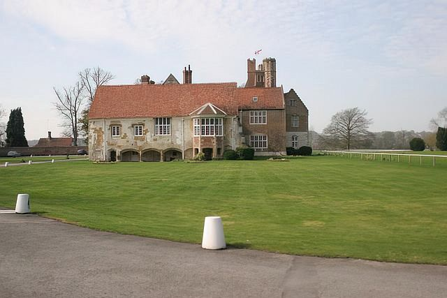 Bisham